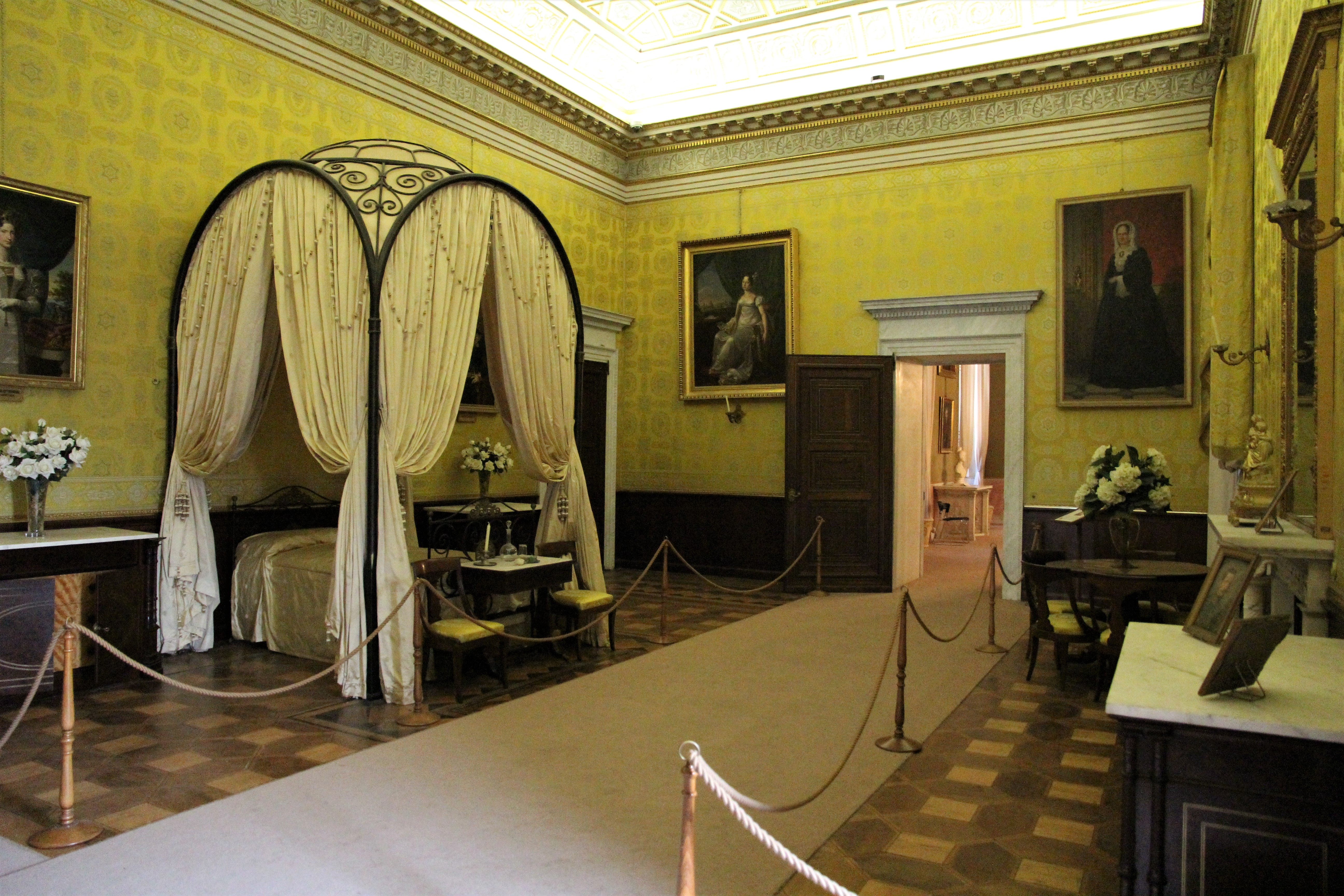 Racconigi, il castello